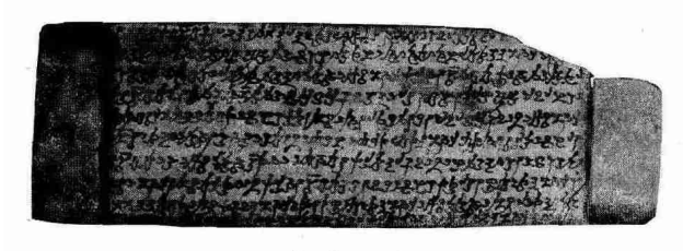 中文（中国大陆）: 1件记载着东晋初年西域鄯善国的买卖纠纷判决书的佉卢文木牍